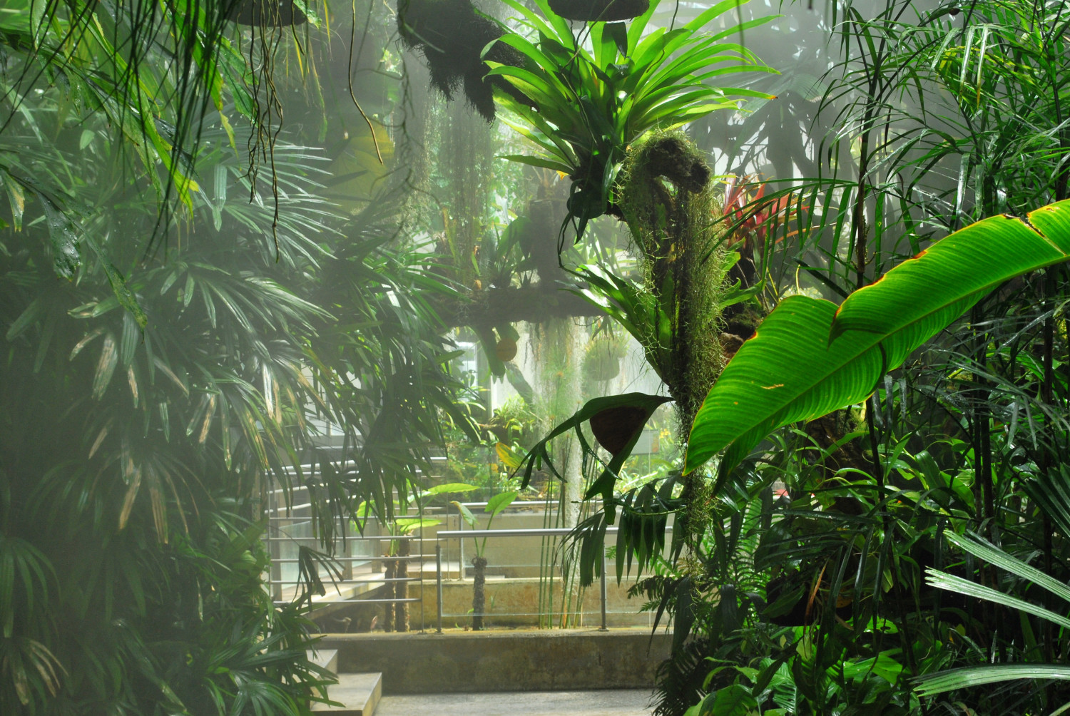 Invernadero Real Jardin Botanico de Madrid